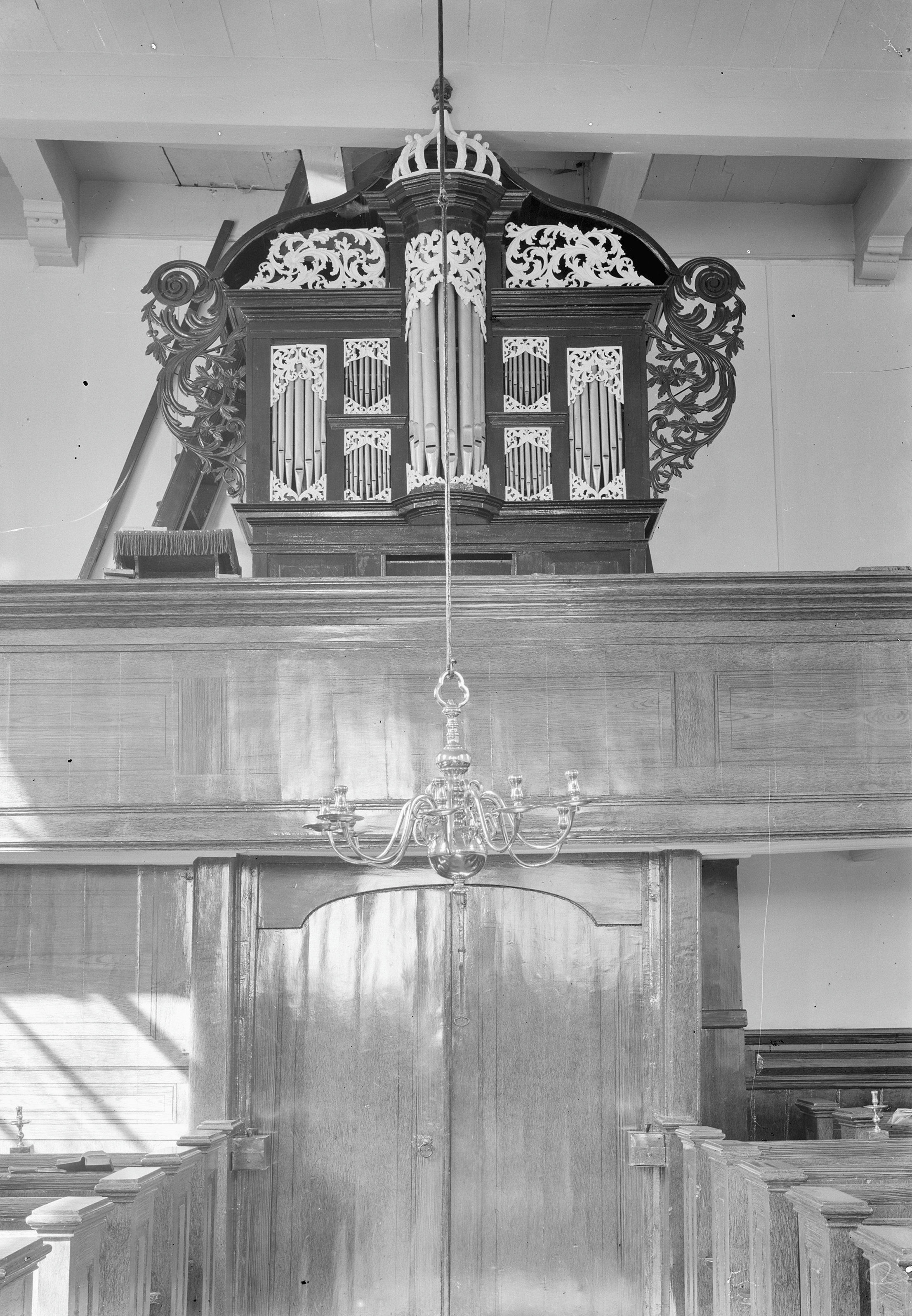 Nederlands Hervormde Kerk: orgel